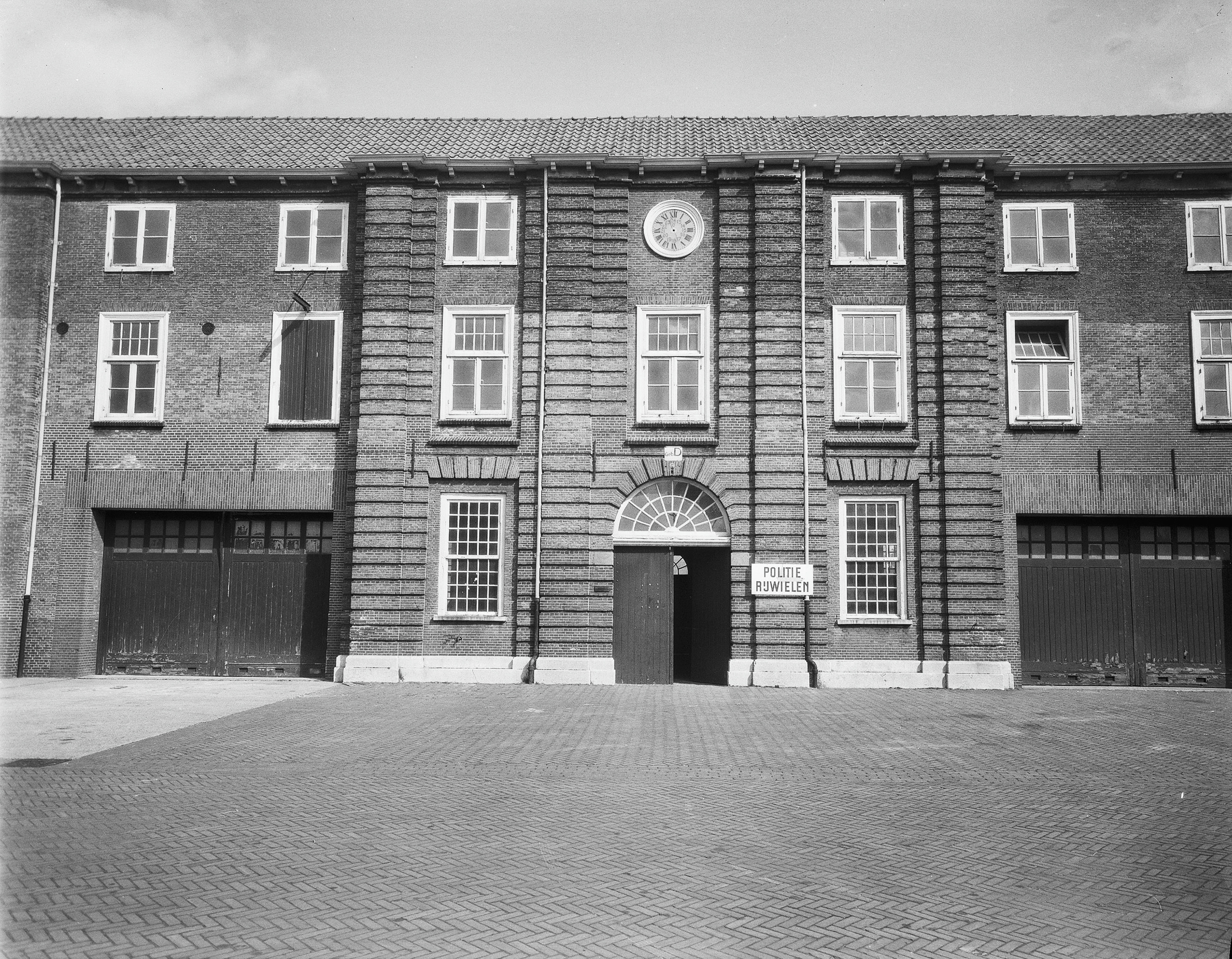 Frederikskazerne: exterieur